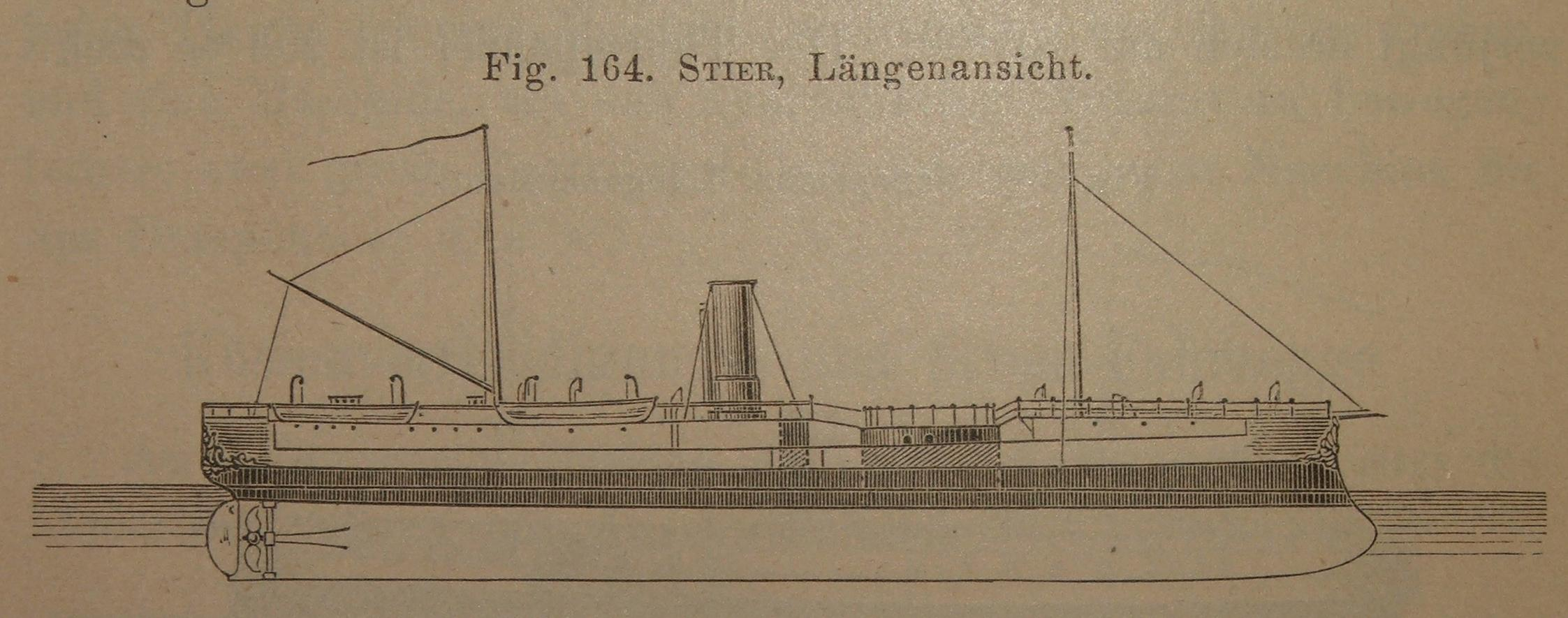 Niederländischer Panzer-Widder Stier aus: von Kronenfels, J. F.: Das schwimmende Flottenmaterial der Seemächte. Eine kurzgefasste Beschreibung der wichtigsten europäischen, amerikanischen und asiatischen Kriegsschiffe der neueren und neuesten Zeit. A. Hartleben's Verlag, Wien. Pest. Leipzig 1881.